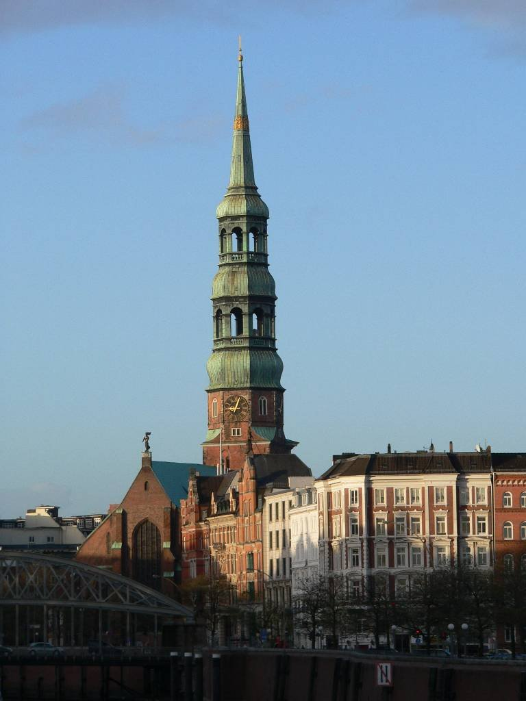 Hauptkirche St. Katharinen in HamburgThis is a photograph of an architectural monument.